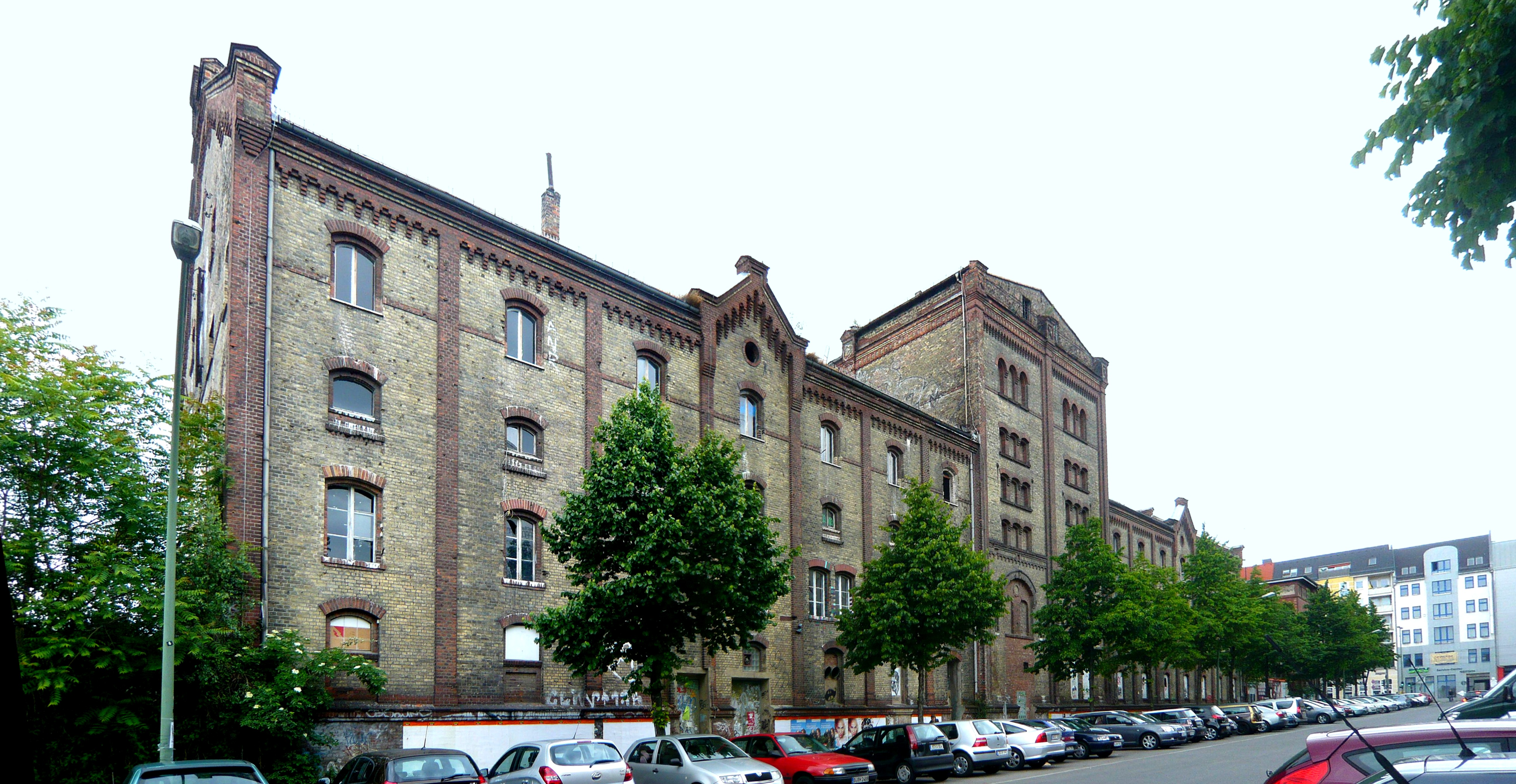 Berlin-Friedrichshain, ehemalige Brauerei Patzenhofer-Schultheiß, Baudenkmale in der Richard-Sorge-Straße